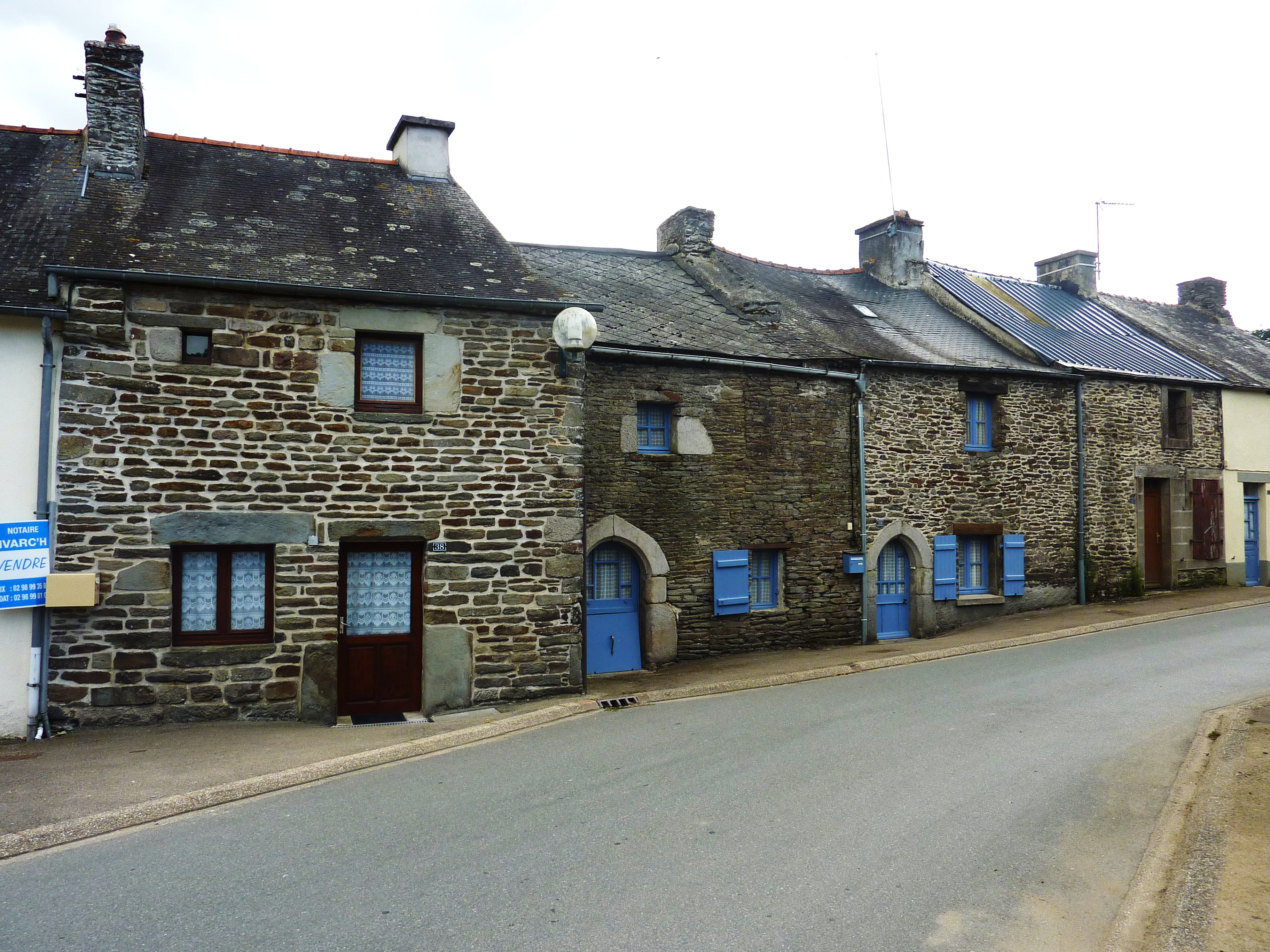 Plounévézel : vieilles maisons de Kergroas près du Petit Carhaix